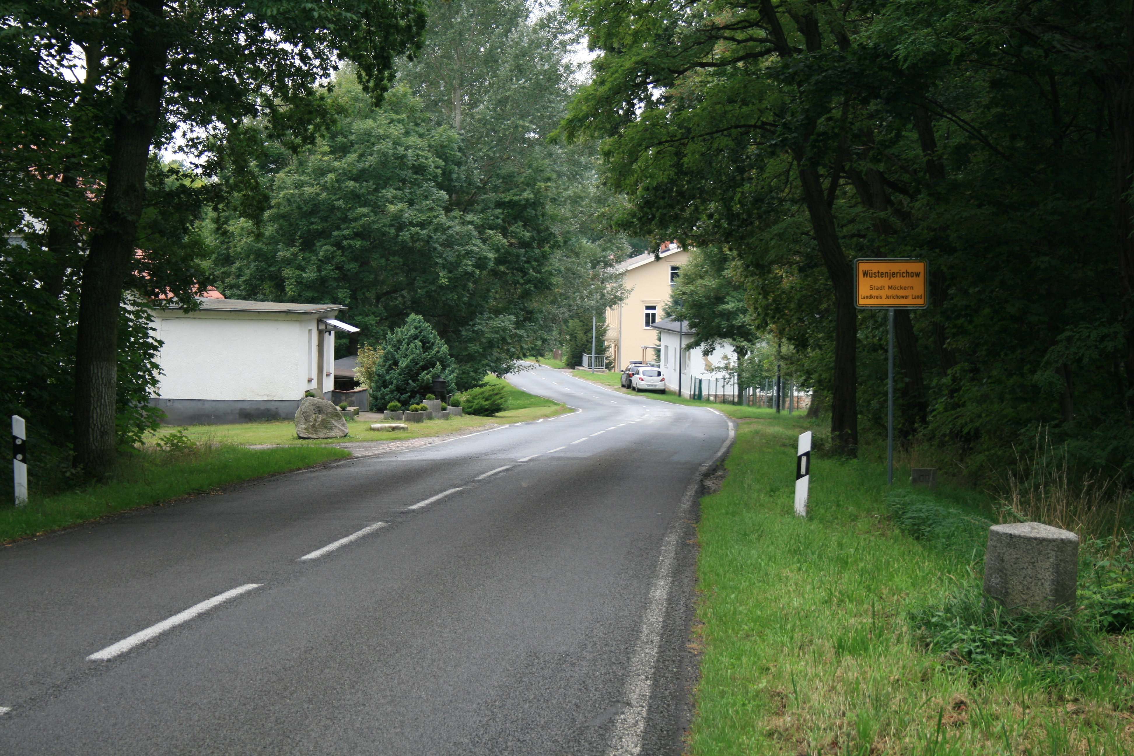 Ortseingang der L 52 von Drewitz